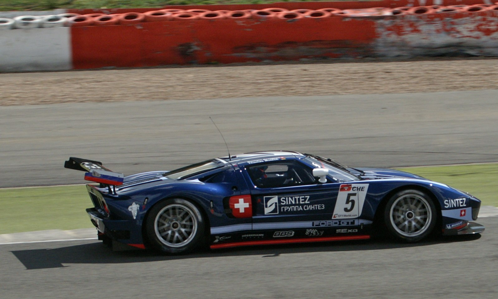 Silverstone Super Cars 2010